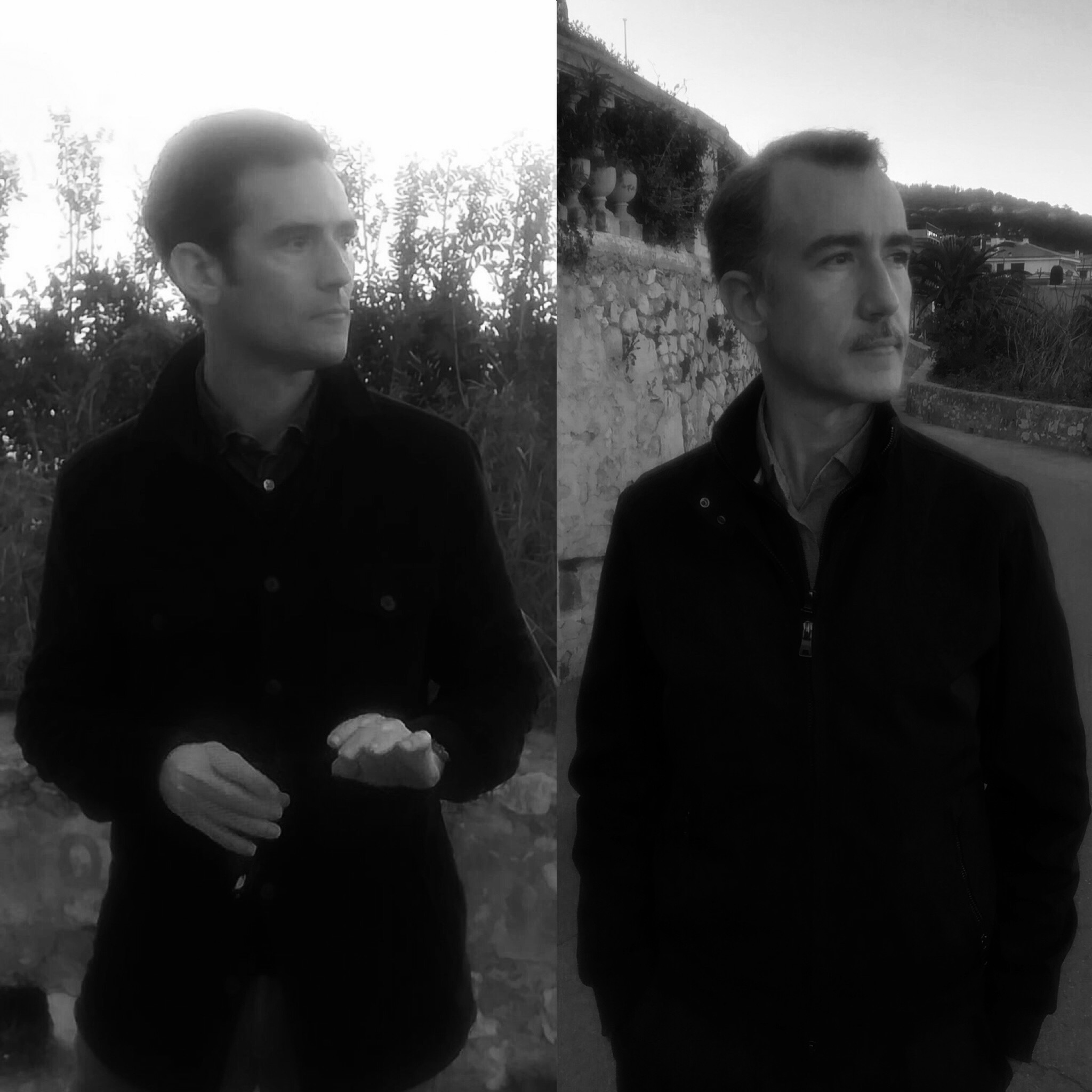 Photographie de Gabriel Méxène prise le 20 février 2019 Promenade Rouvier à Saint-Jean-Cap-Ferrat